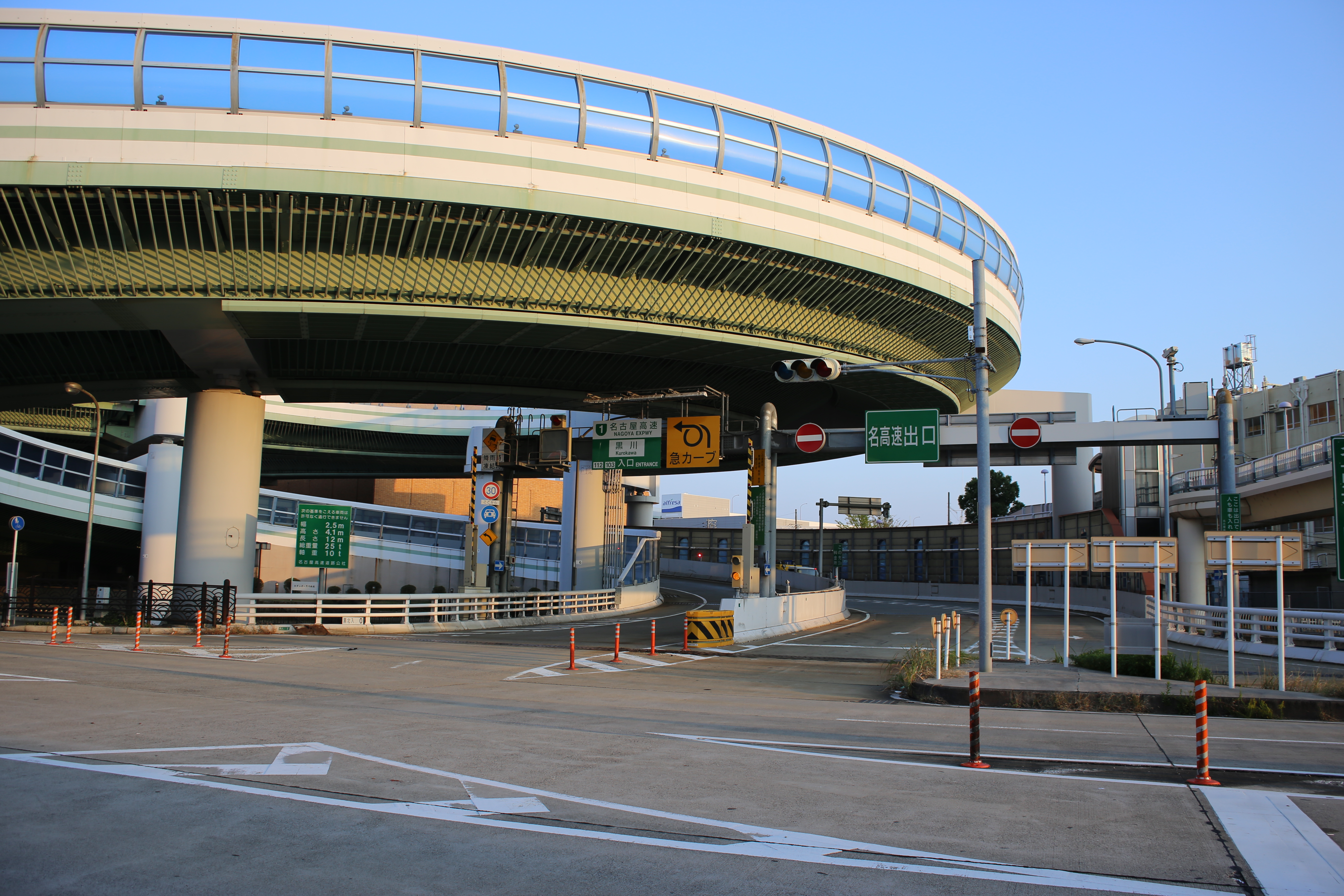 名古屋市北区清水四丁目の名古屋高速1号楠線黒川出入口を北側公道西側より撮影